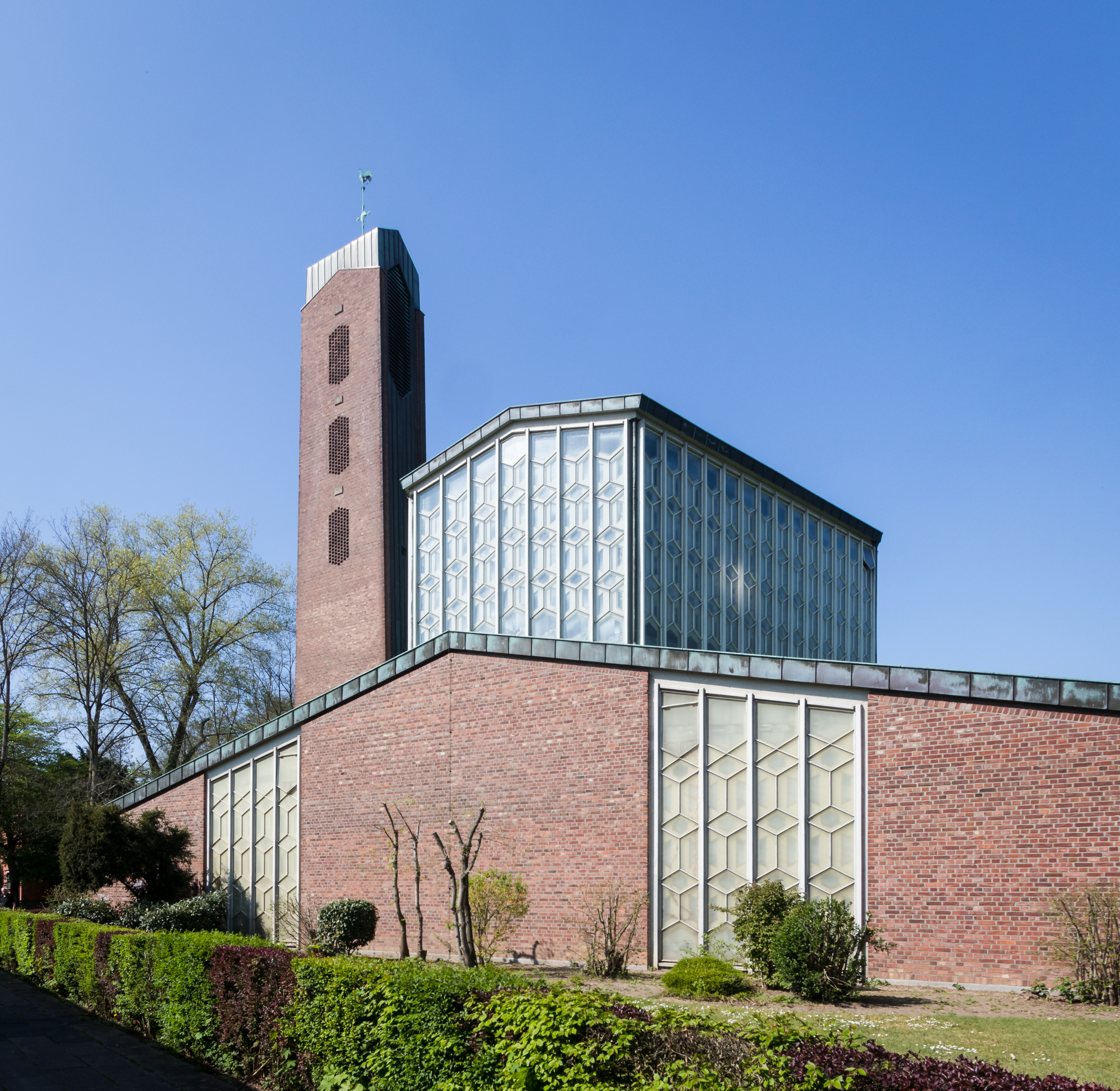 Kirche St. Bruder Klaus, Köln-Mülheim. Architekt: Fritz Schaller